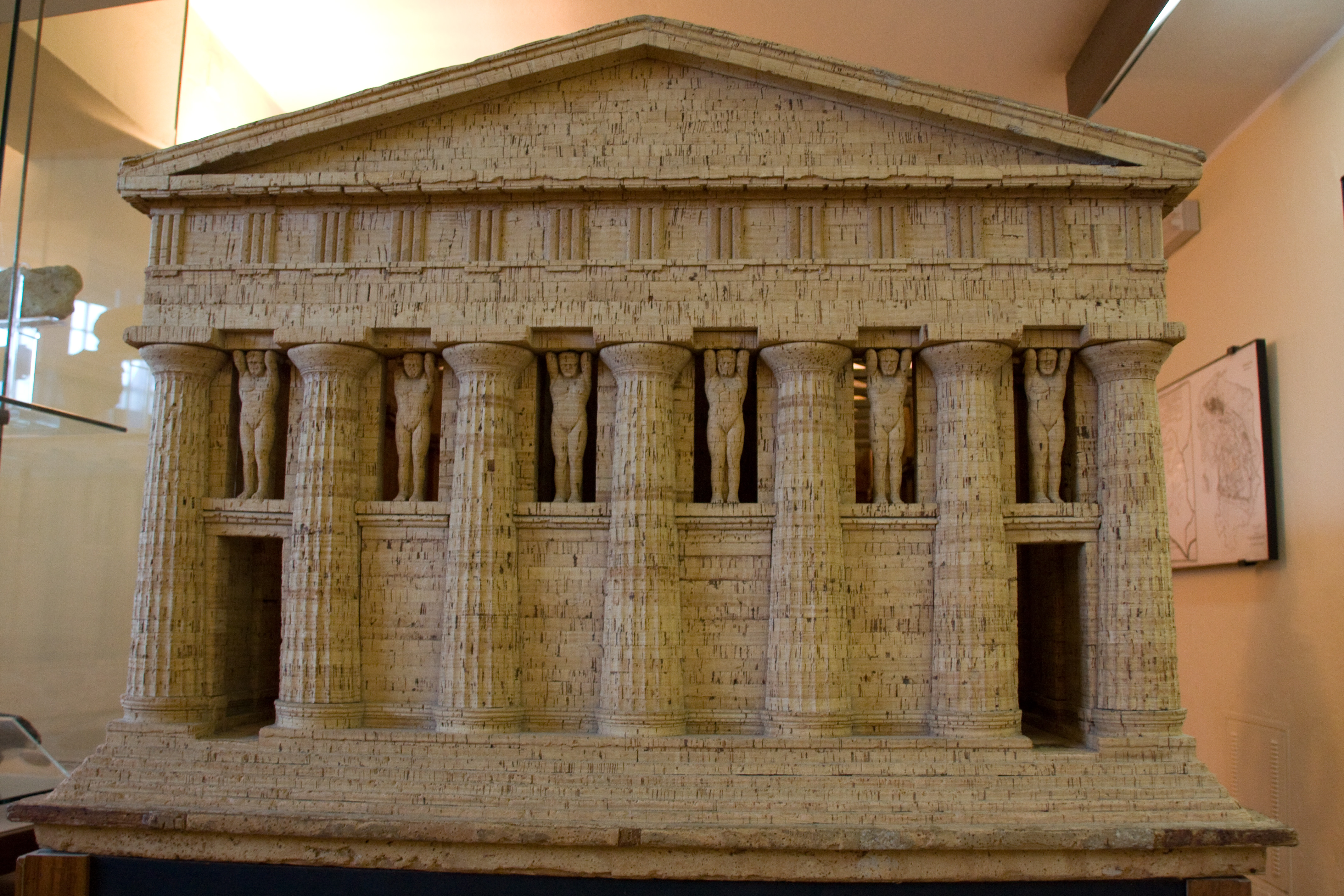 Museo Archeologico (Musée Archéologique) , Agrigento , Sicile, Italie